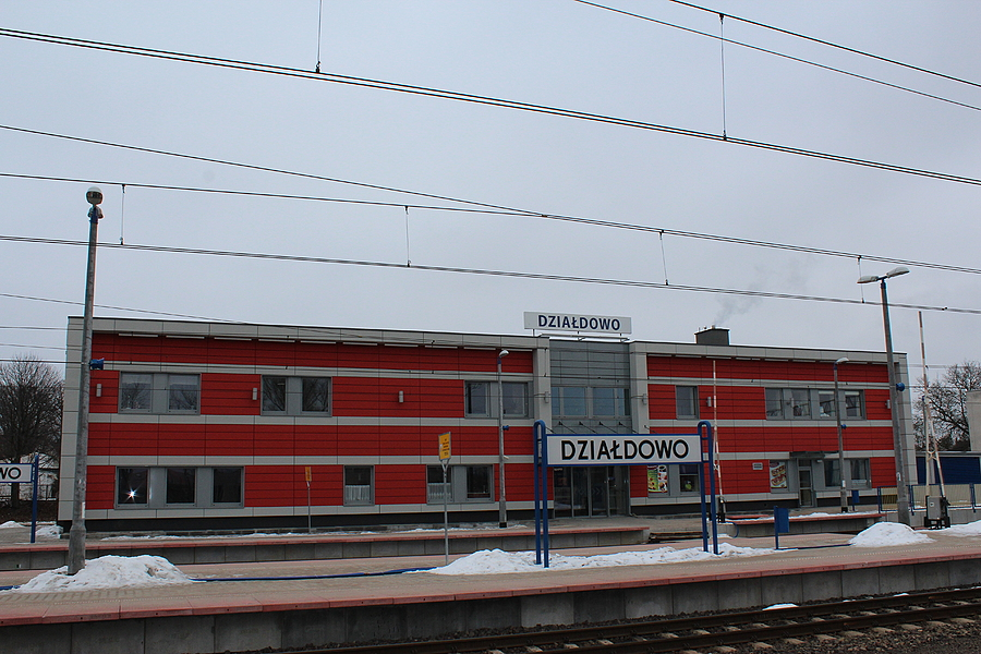 Dworzec Działdowo, 2013